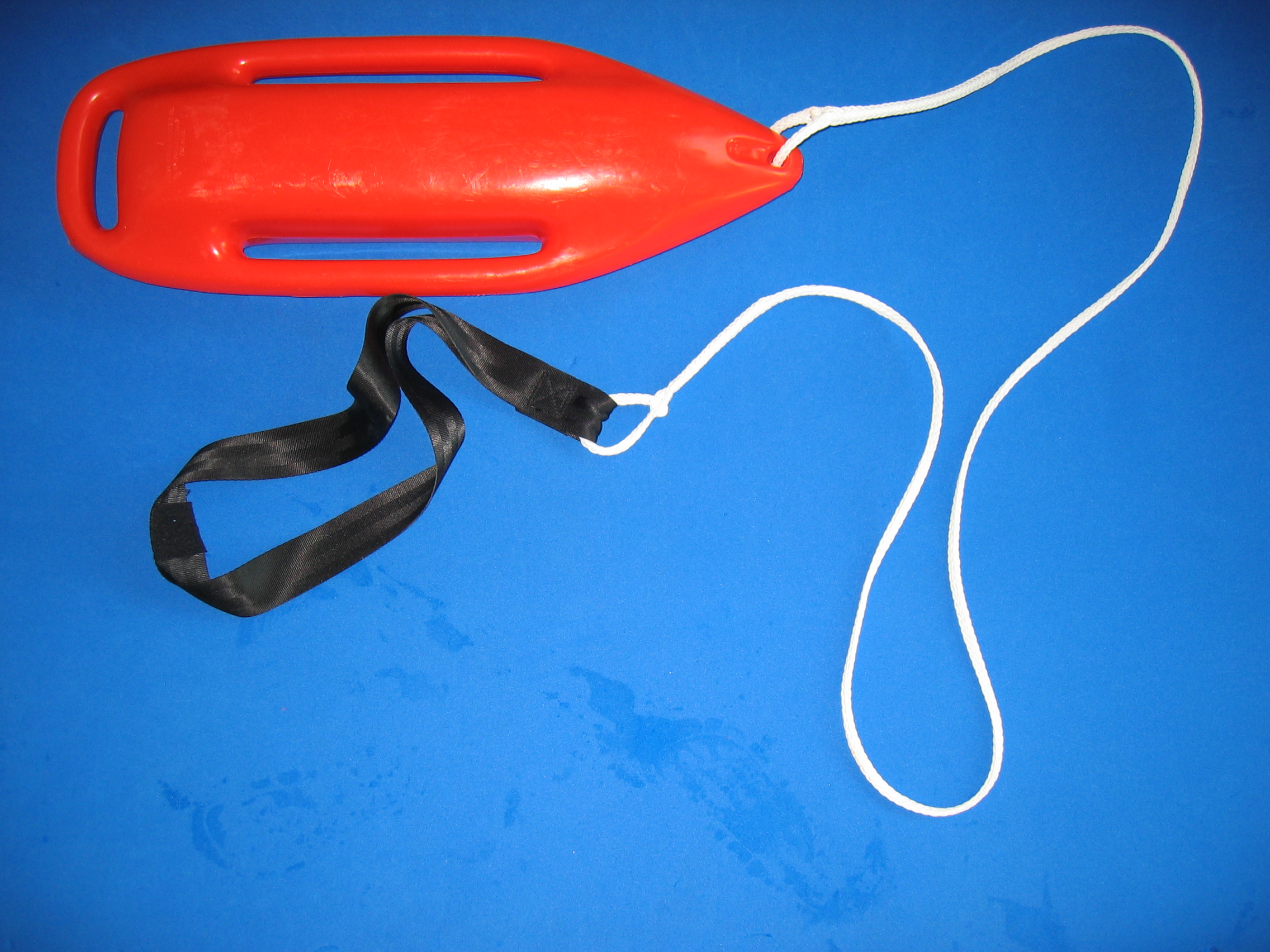 Eine Rettungsboje der DLRG